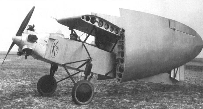 Kalinin K-9, spojovací a sportovní letoun